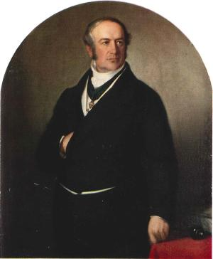 Uno Troili